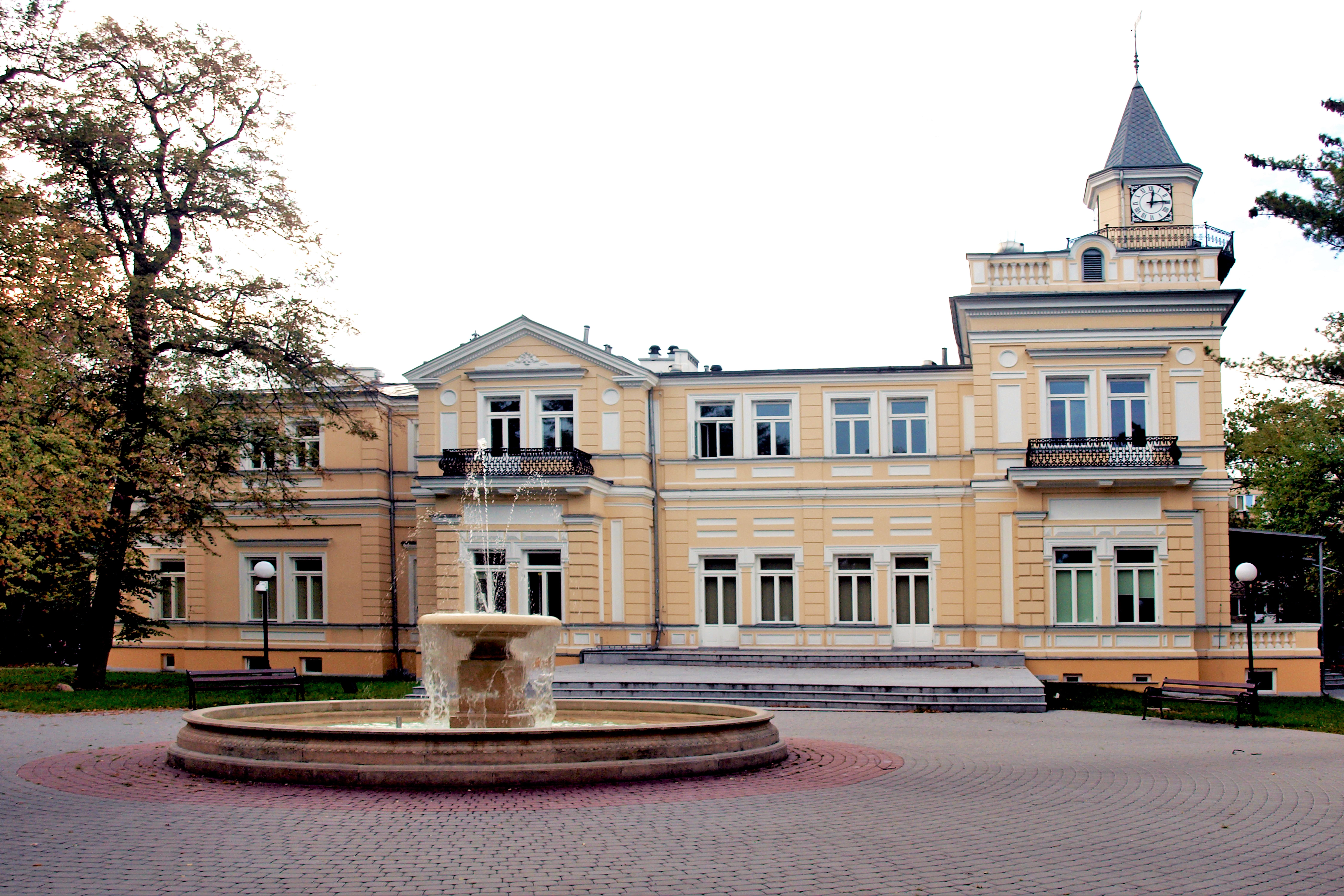 pałacyk Sokoła 1867 Pruszków, ul. Kościuszki 41